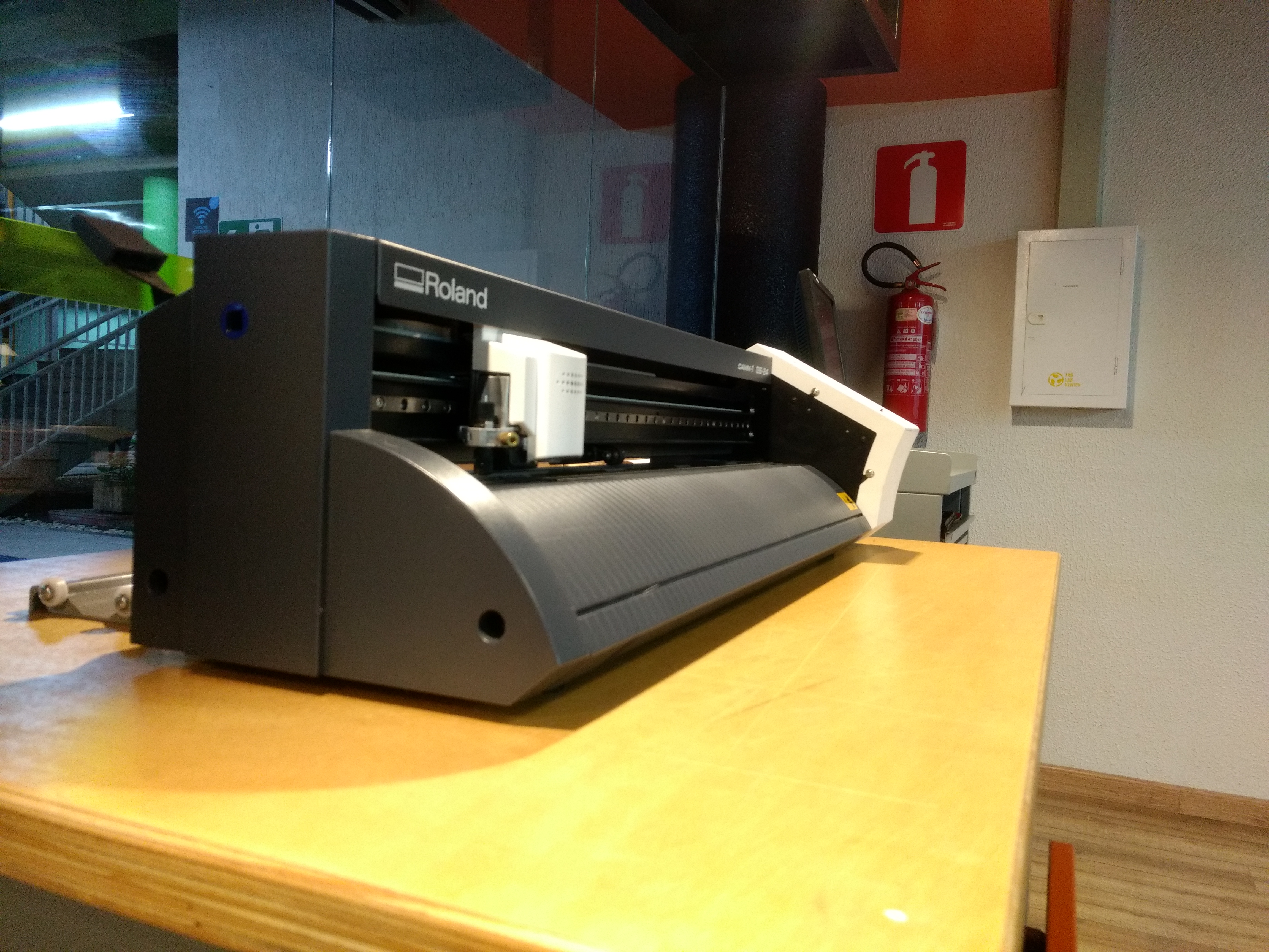 Plotter disponível no FabLAB Newton